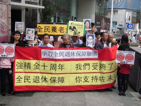 中文（香港）: "強積金 我們受夠了！ 全民退休保障 你支持左未？"行動